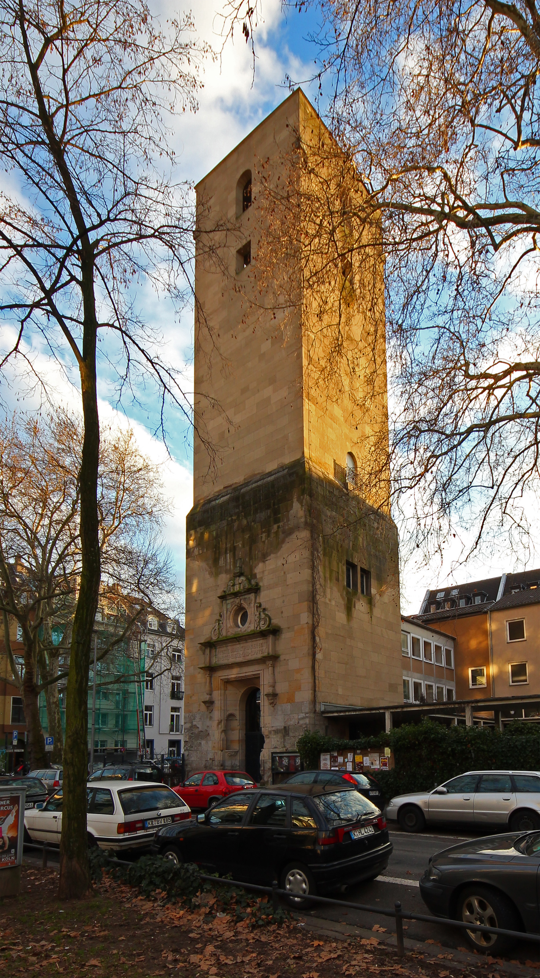 Kirchturm der Lutherkirche in der Kölner Südstadt